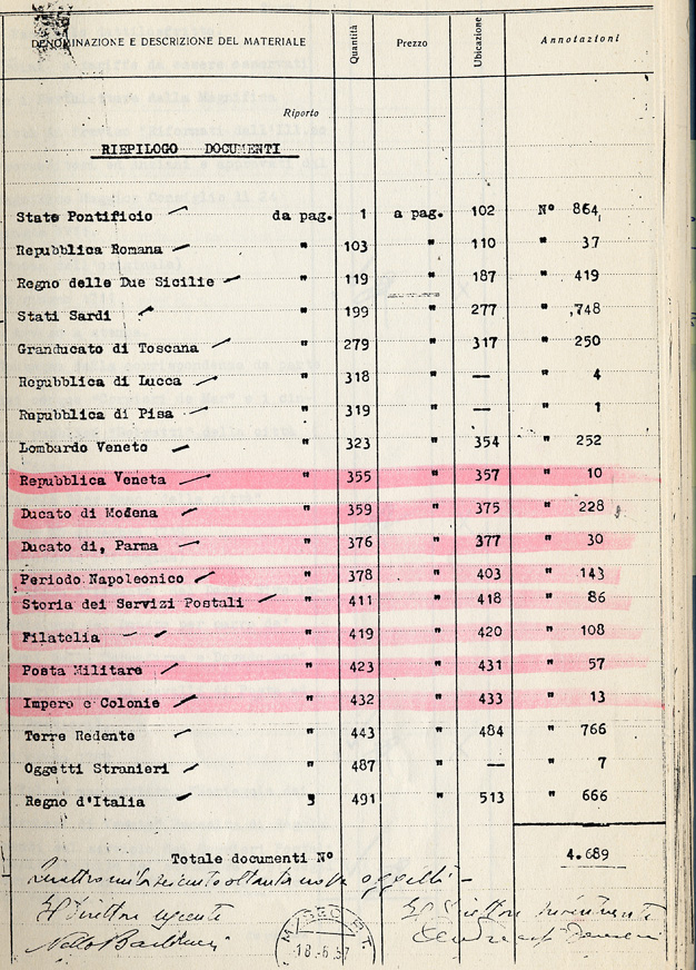 Un inventario filatelico, datato 18 giugno 1957